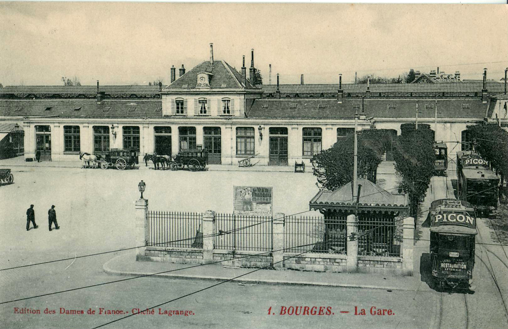 Carte postale ancienne éditée par les Dames de France, cliché Lagrange, n°1 : BOURGES - La Gare